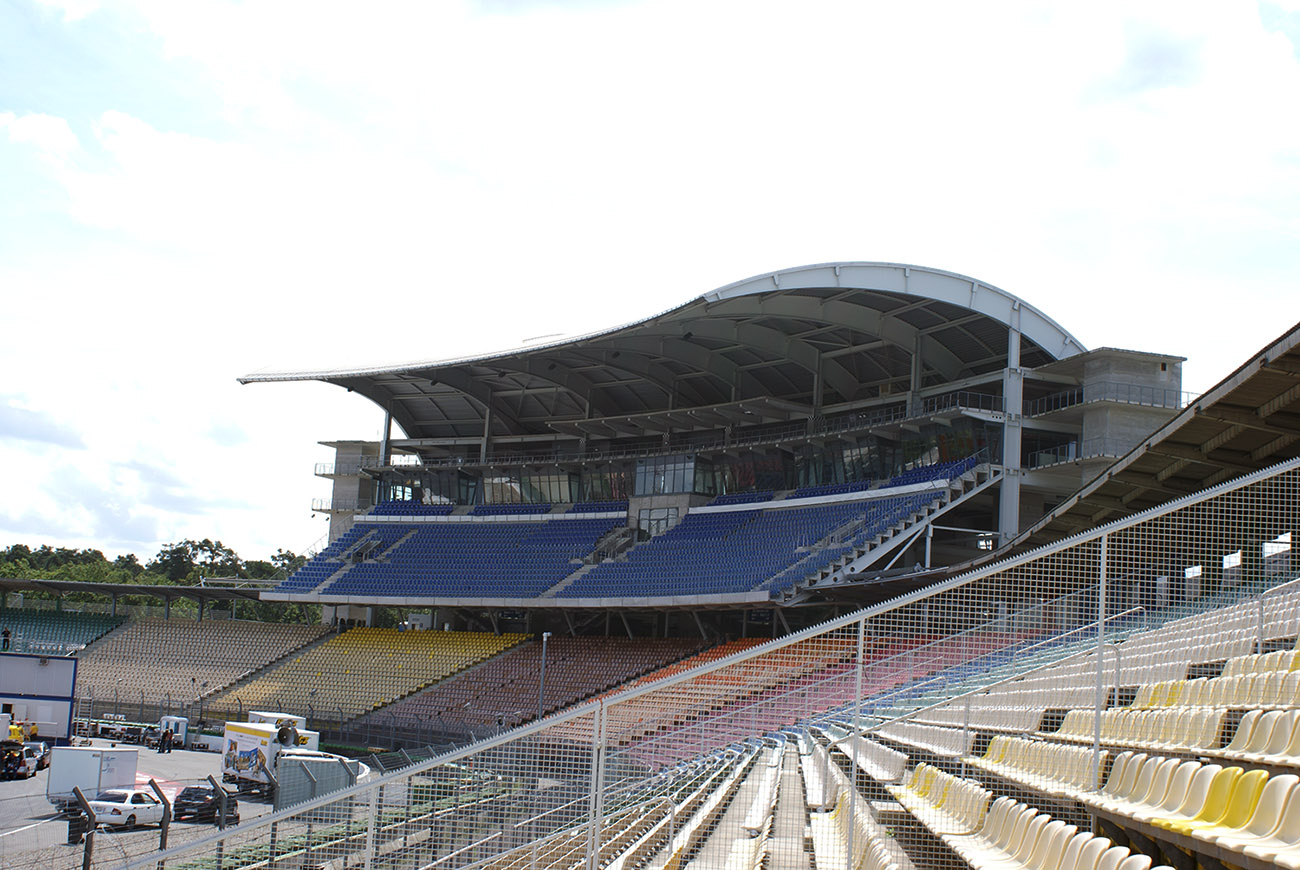 Süd-Tribüne Hockenheimring